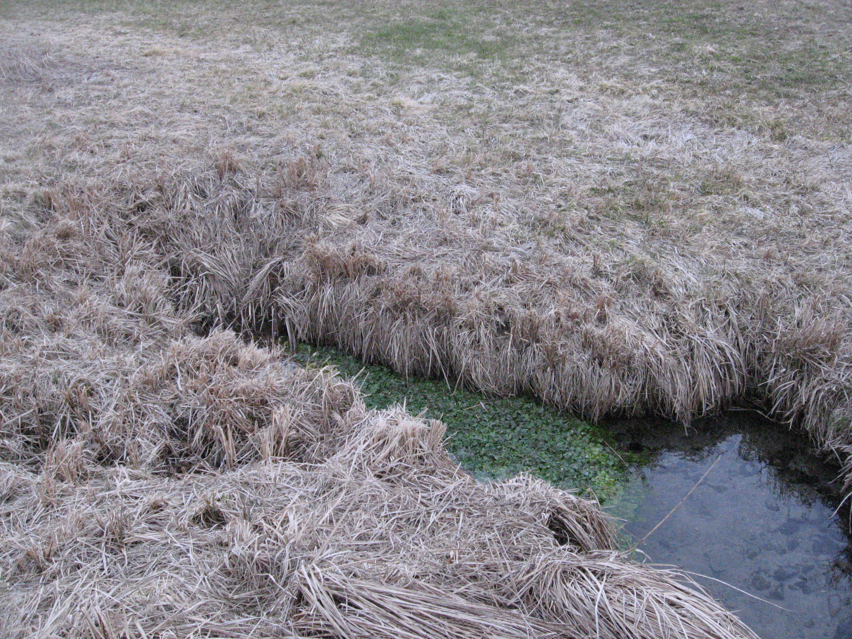 Blick Nach N auf die geschützte Wiesenquelle des linken Zweigs des Ernsbachs, der über den Riedbach in die Bühler entwässert. Liegt etwa 350 m E der L 1060 wenige Schritte von einem Feldweg, der an einer von dieser angeschnittenen Kuppe bei Obersontheim-Hausen von ihr nach E abgeht.